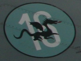 Mirage III FlSt16